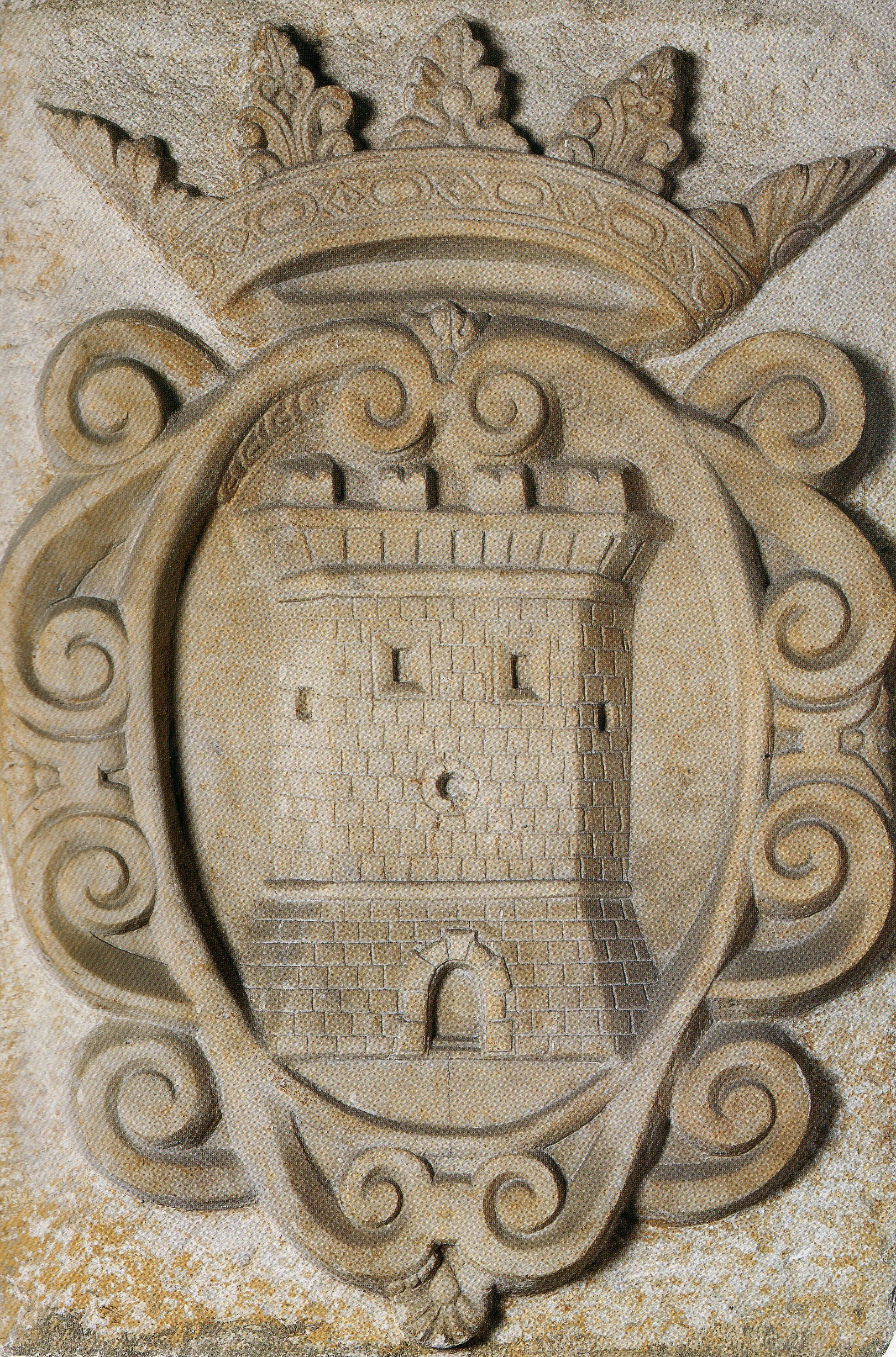 Stemma di Sassari con le "barras" d'Aragona